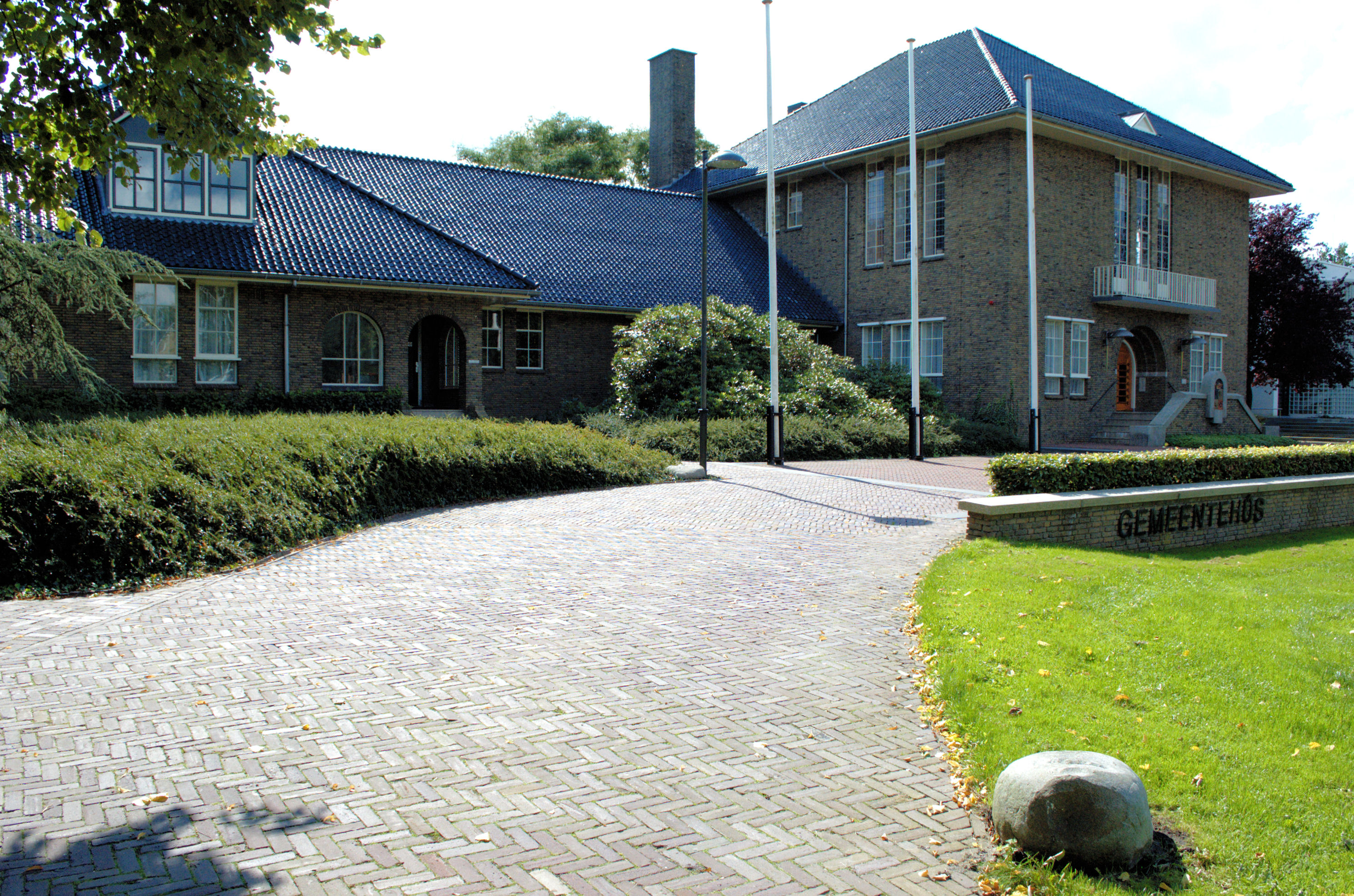 Gemeentehuis van de gemeente Tytsjerksteradiel, Raadhuisweg 7 in Burgum